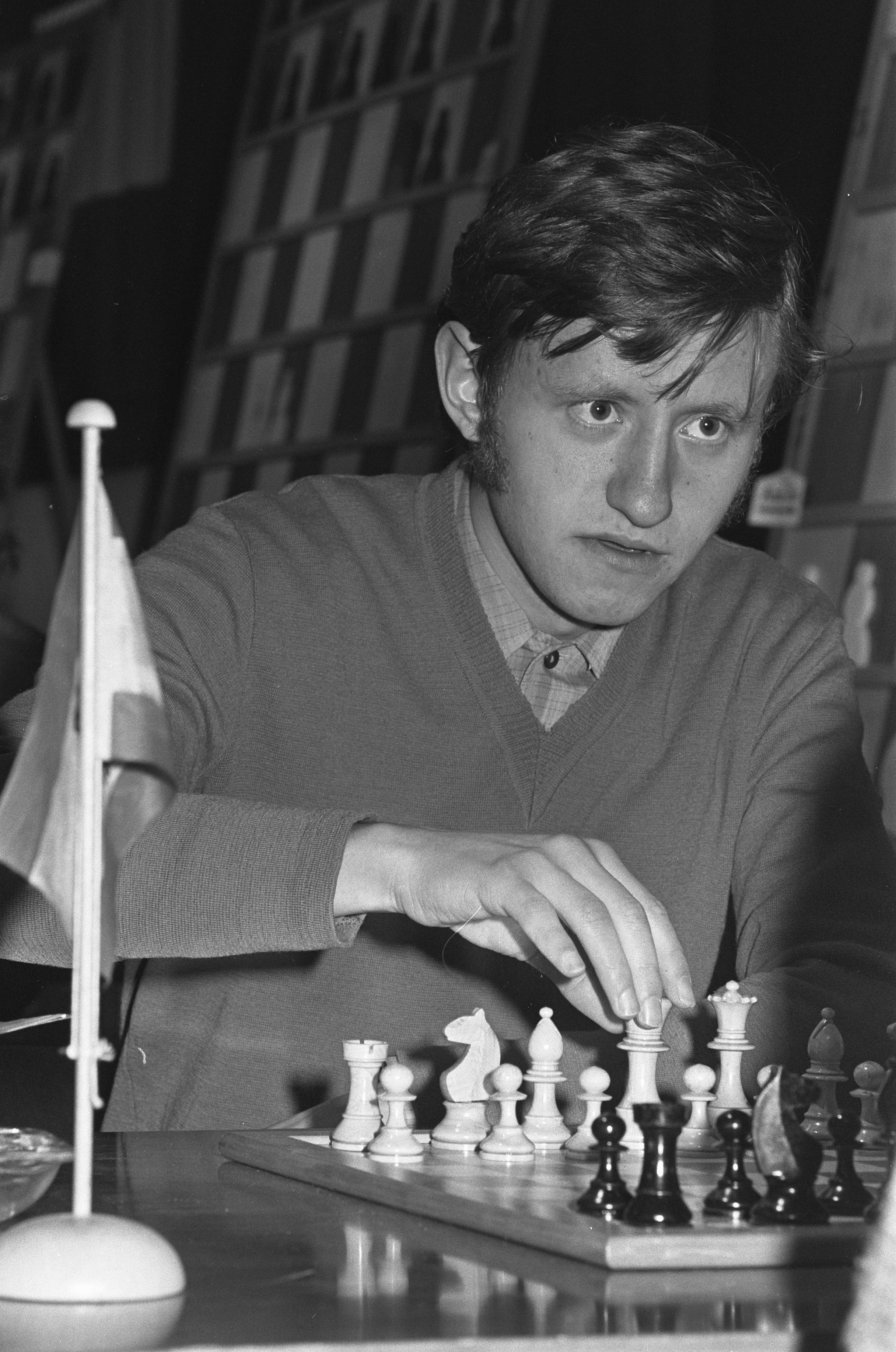 Europees Jeugdkampioenschap Schaken (tiende Niemeyer schaaktoernooi) te Groningen 1972, Romanishin.